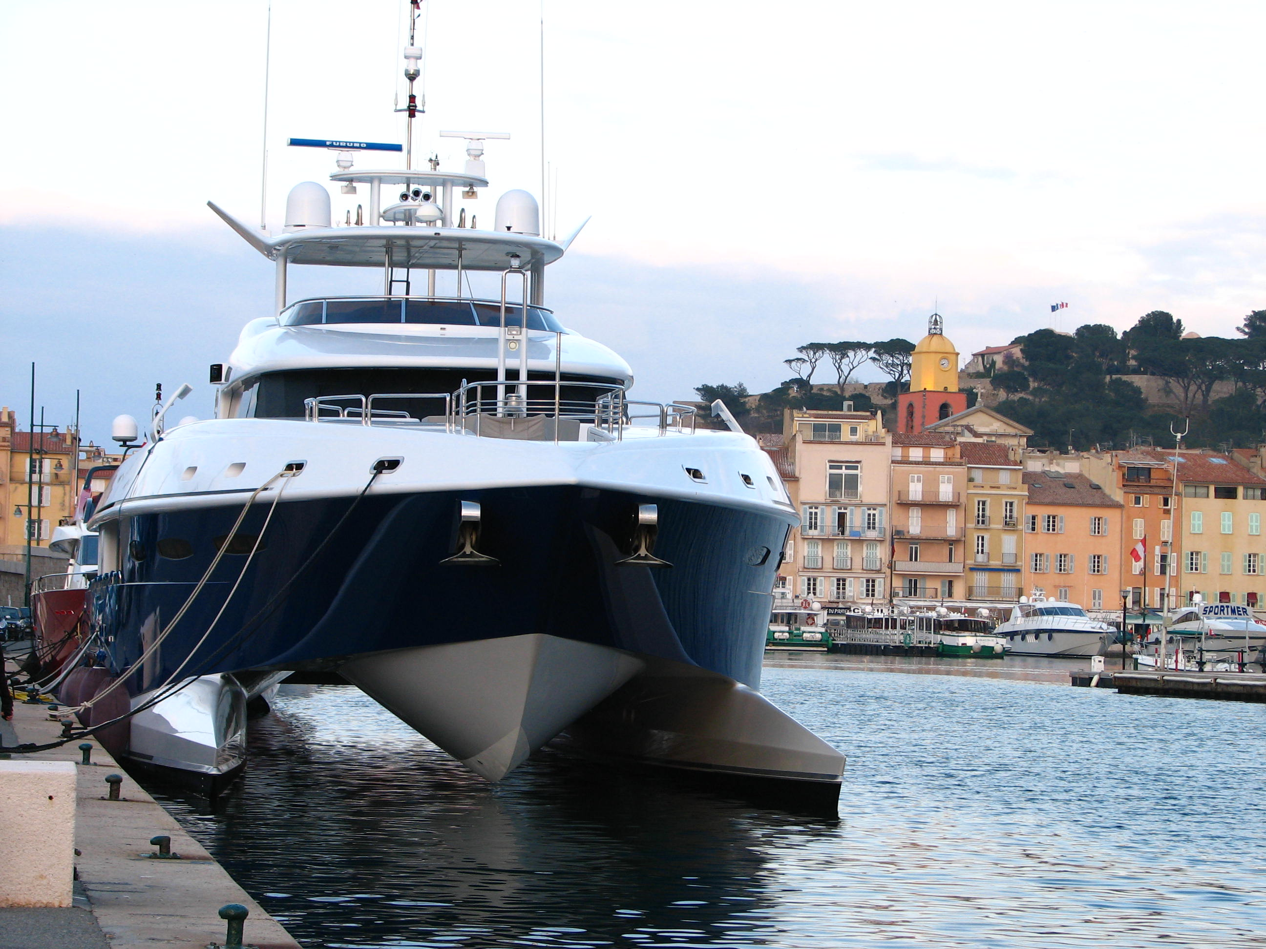 Saint Tropez(Francja), Katamaran w porcie